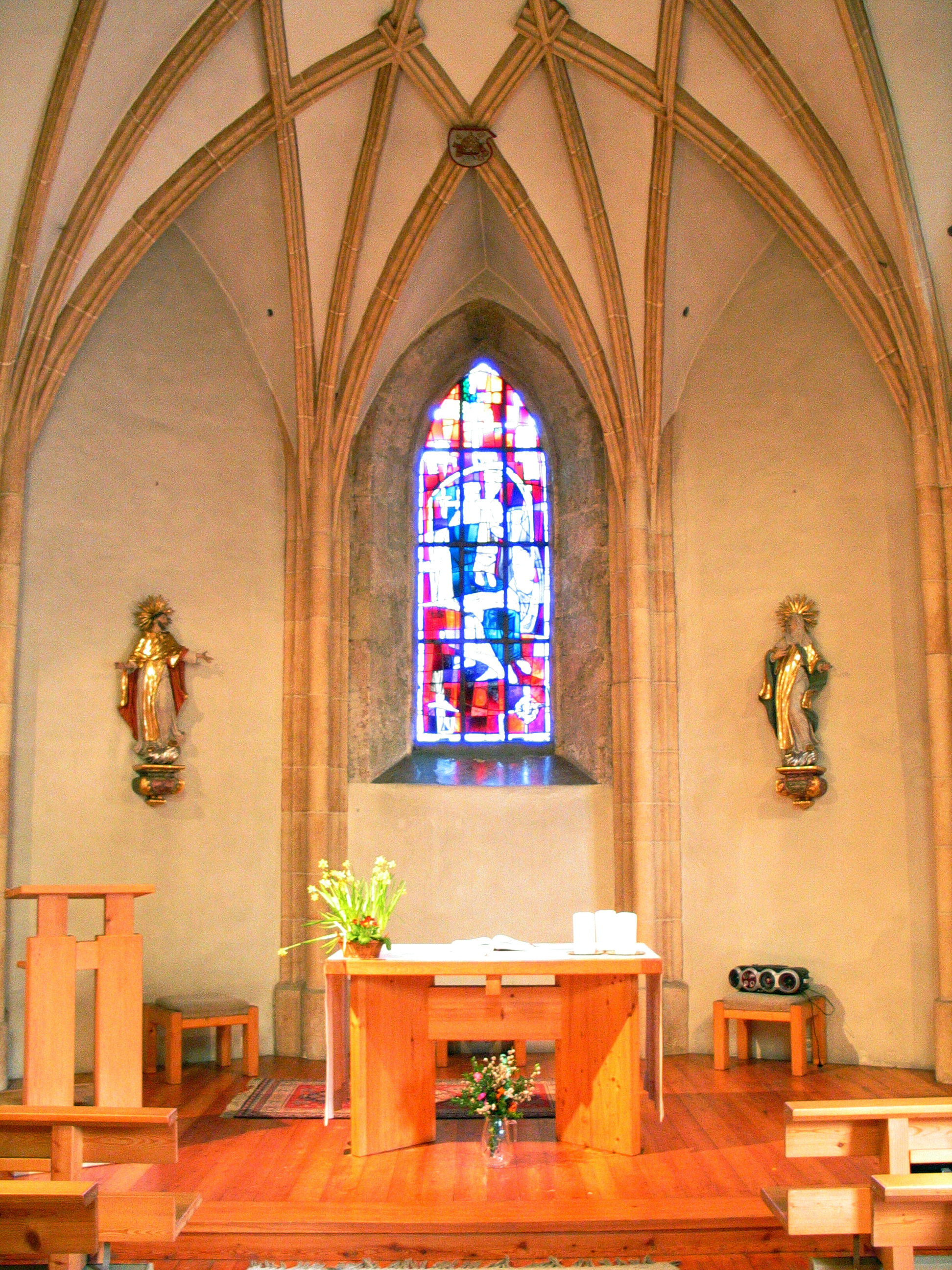 Annakepelle Sankt Johann im Pongau Innenaufnahme